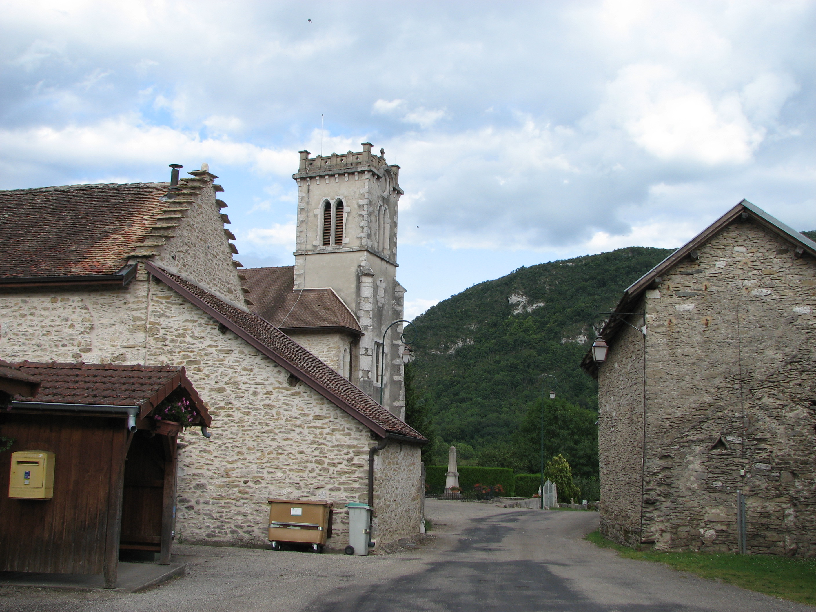 Village de Prémeyzel (Ain)